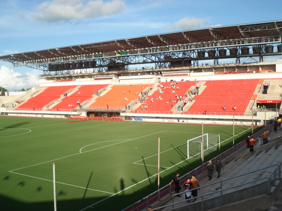 Foto tirada por mim, Davi Sopchaki, do novo estádio do Acre.